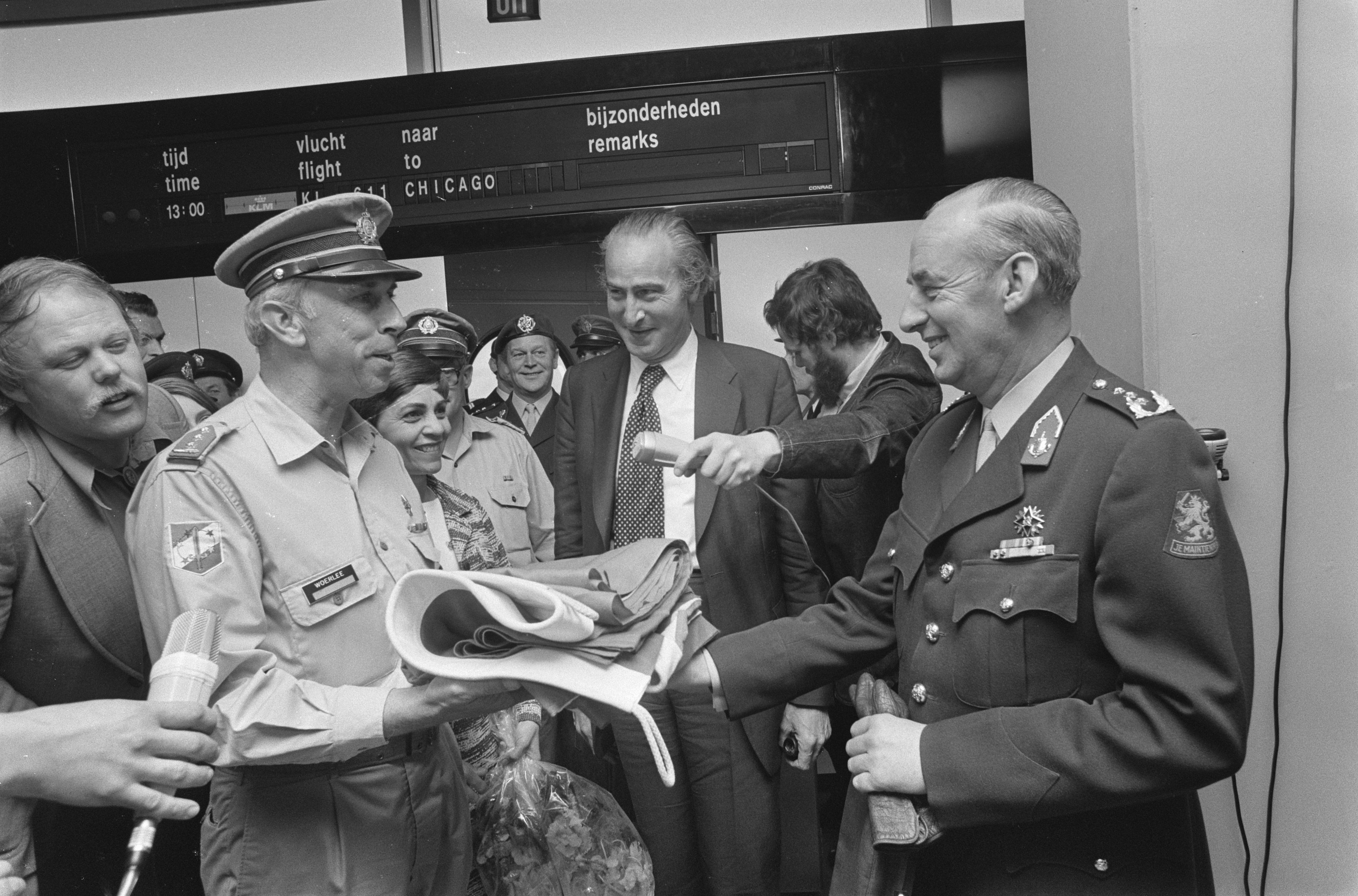 Collectie / Archief : Fotocollectie Anefo Reportage / Serie : [ onbekend ] Beschrijving : Laatste Nederlandse militairen uit Suriname terug op Schiphol; Tris commandant kolonel Woerlee overhandigt detachementsvlag aan generaal Van der Slikke , m. Datum : 27 november 1975 Trefwoorden : GENERAAL, MILITAIREN, commandant, overhandigingen, vliegvelden Fotograaf : Mieremet, Rob / Anefo Auteursrechthebbende : Nationaal Archief Materiaalsoort : Negatief (zwart/wit) Nummer archiefinventaris : bekijk toegang 2.24.01.05 Bestanddeelnummer : 928-2933